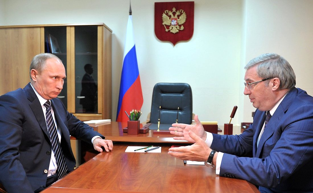 Президент России Владимир Путин с полномочным представителем Президента в Сибирском федеральном округе Виктором Толоконским